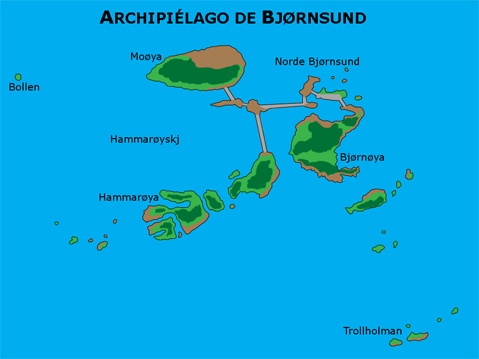 Mapa de Bjørnsund/Bjørnsund map